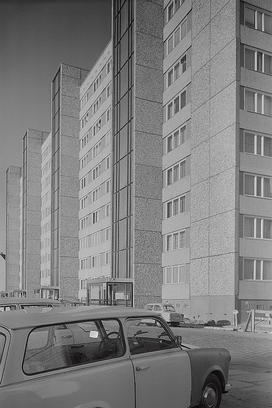 Original image description from the Deutsche FotothekDresden-Johannstadt. Neubaublocks in der Hans-Grundig-Straße